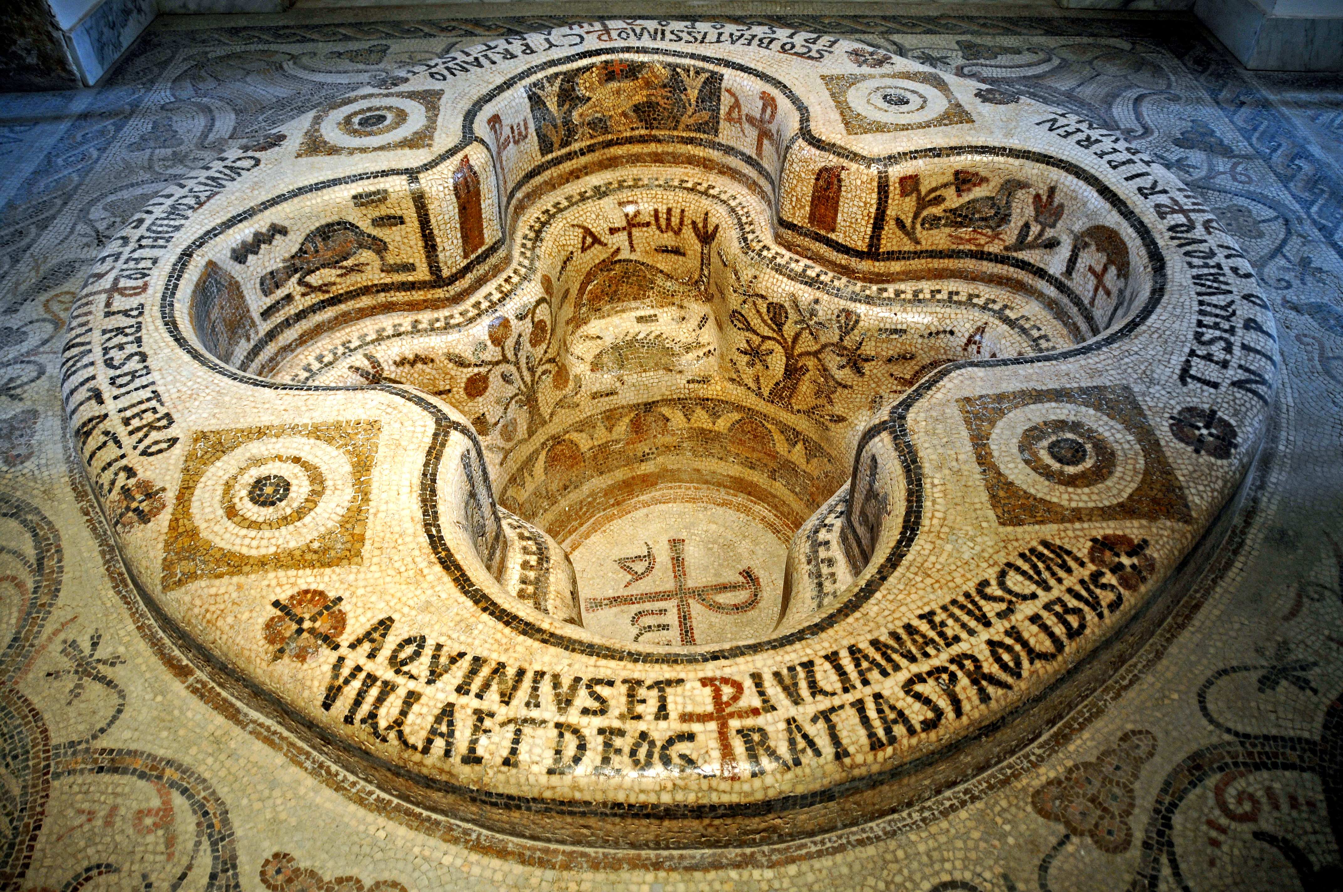 Gros plan sur le baptistère de Kélibia (deuxième moitié du VIe siècle) au musée national du Bardo, en Tunisie.